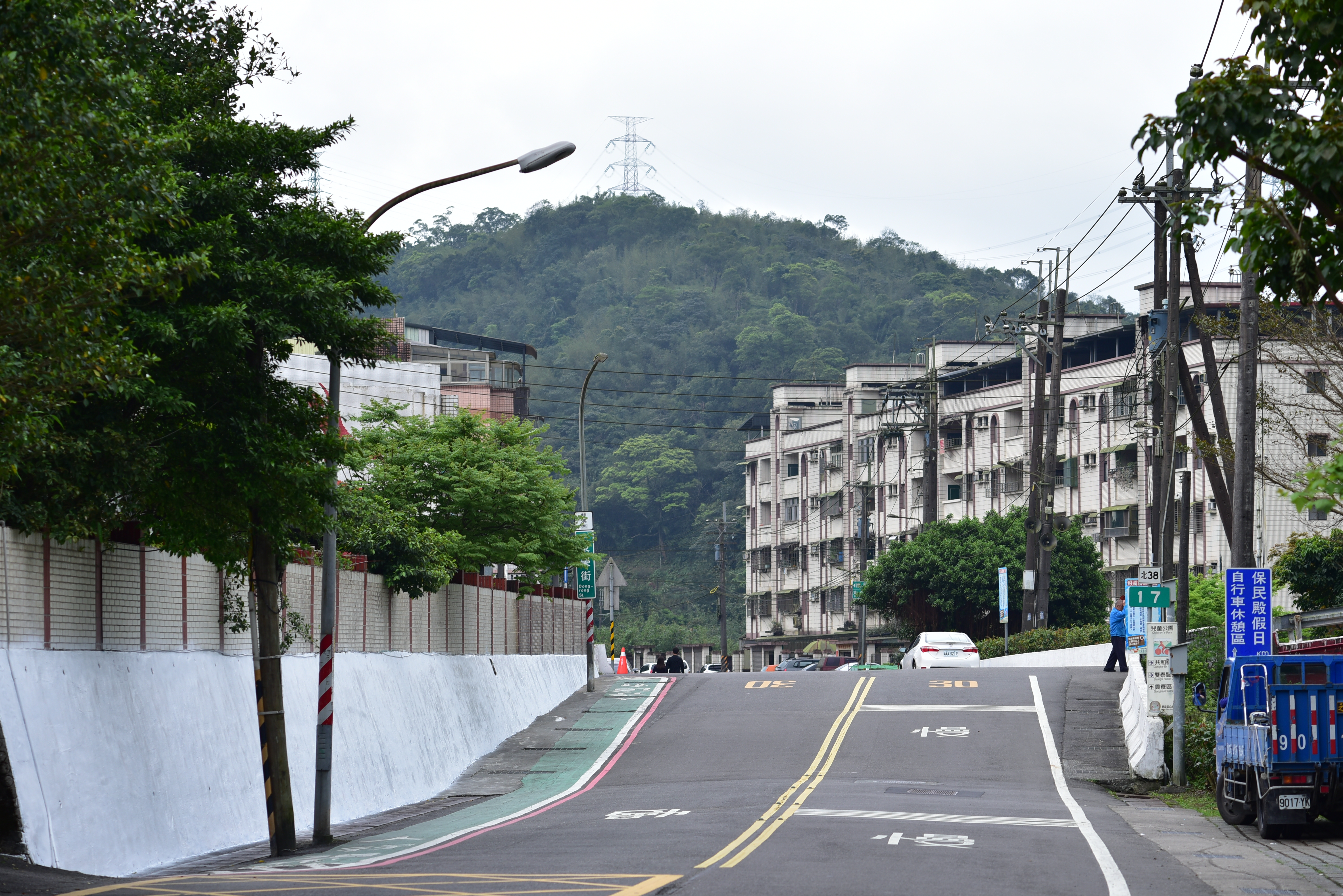 北38線雙溪區段東榮街雙溪國小 Shuangxi District北38線Dong-rong Street2018